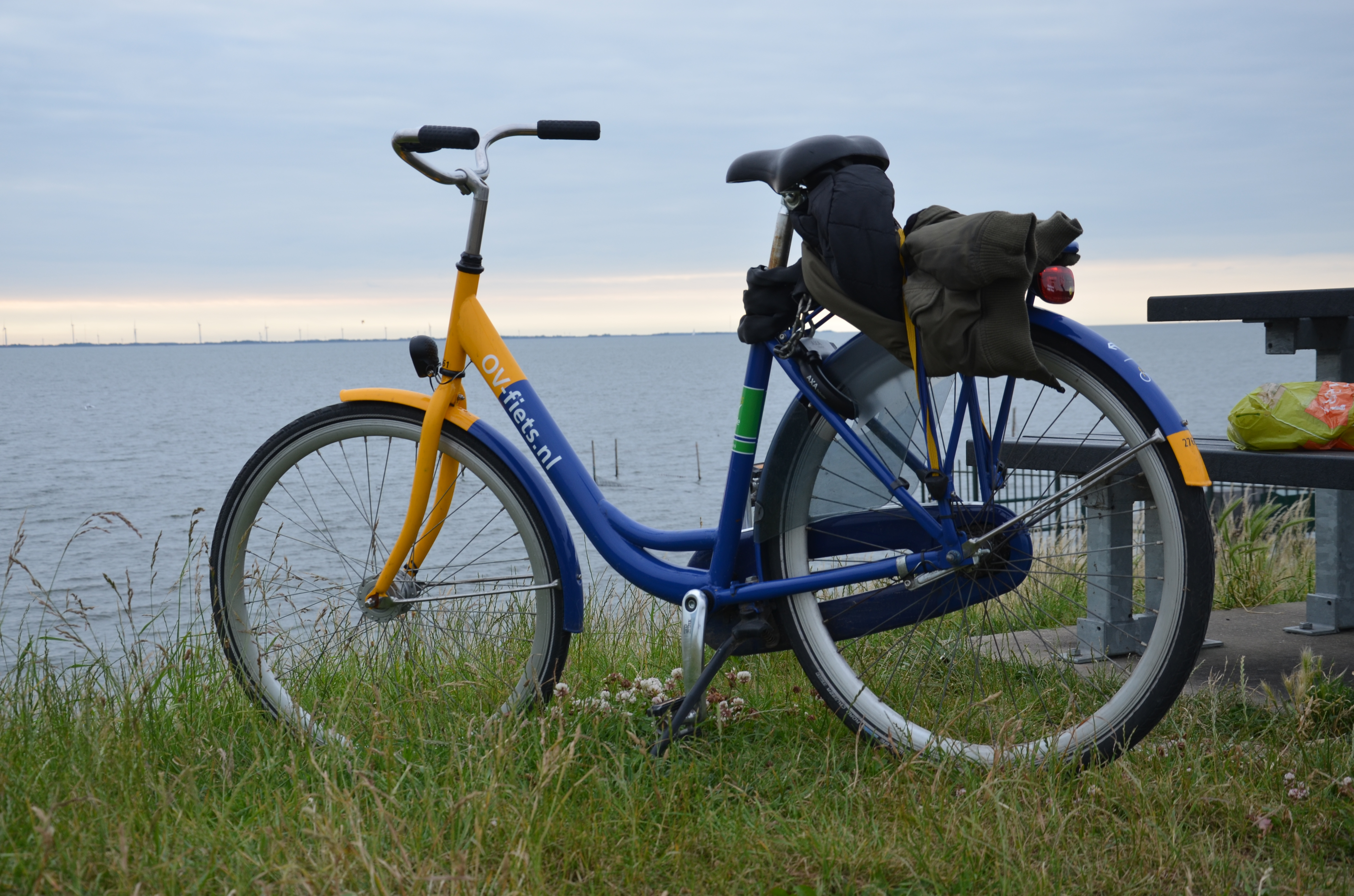 Een OV-fiets langs het water bij Andijk.